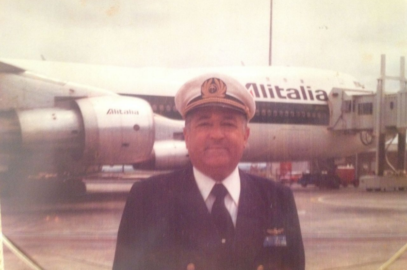 Costantino Petrosellini (Roma, 17 aprile 1921 – Roma, 21 gennaio 2015) aviatore italiano.